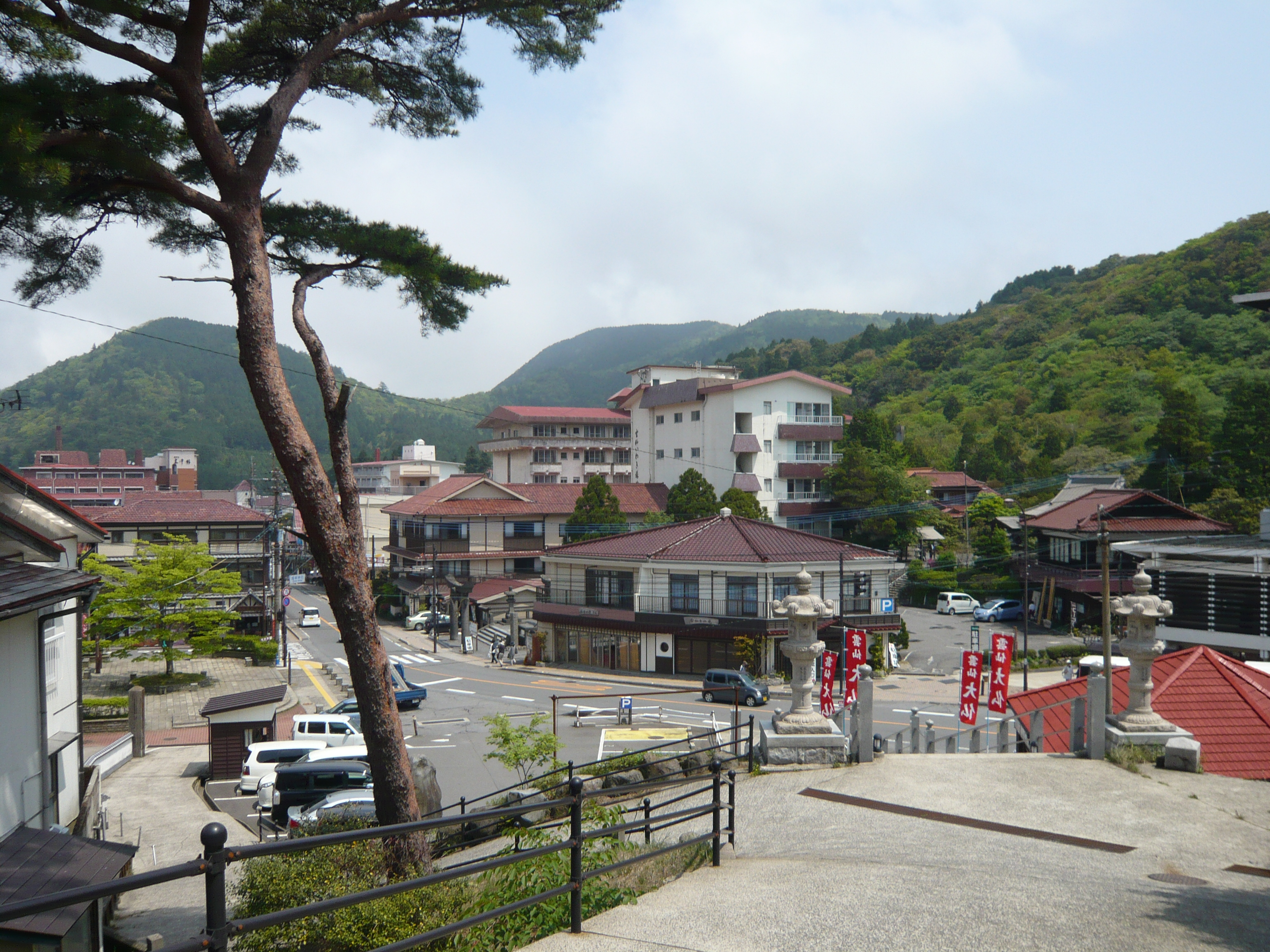 雲仙温泉中心街